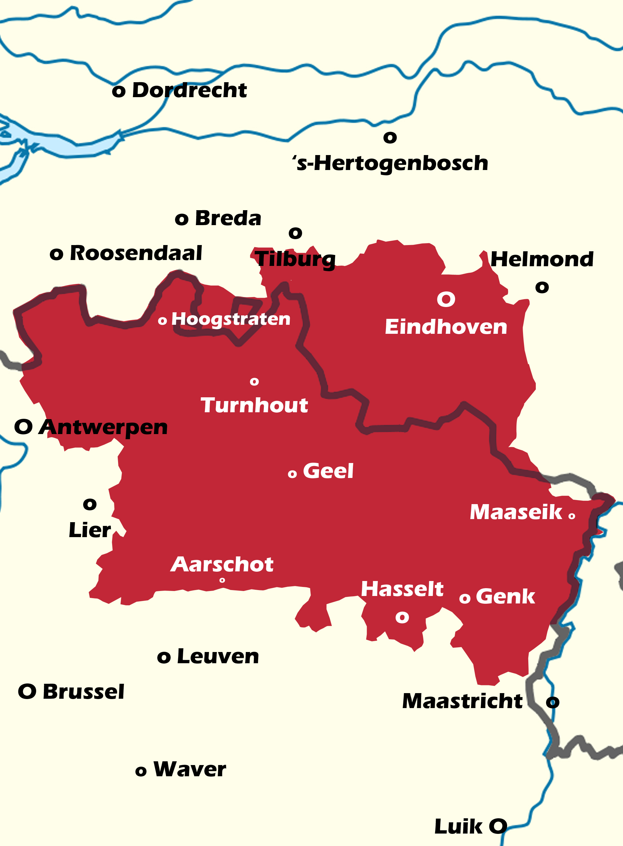 Overzichtskaart De Kempen met belangrijke plaatsen erbij